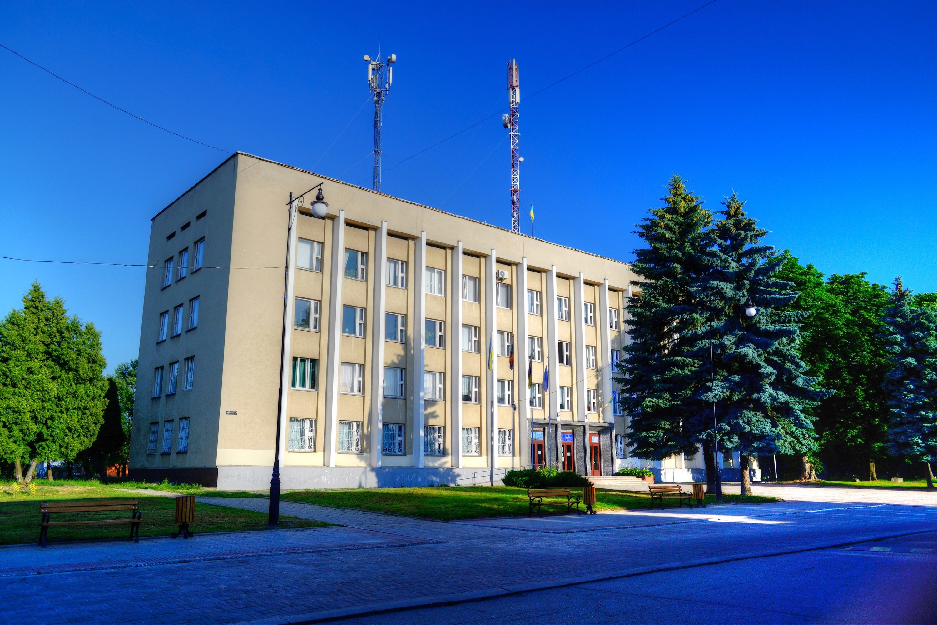 Будівля районної,міської ради і адміністрації.